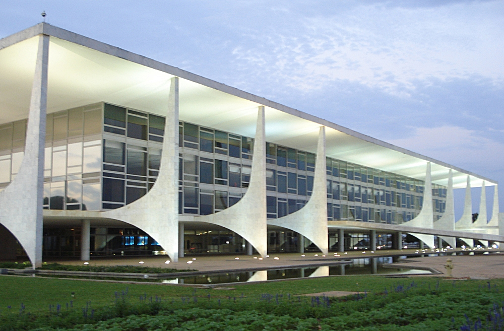 Palácio do Planalto, Brasília, Brasil.